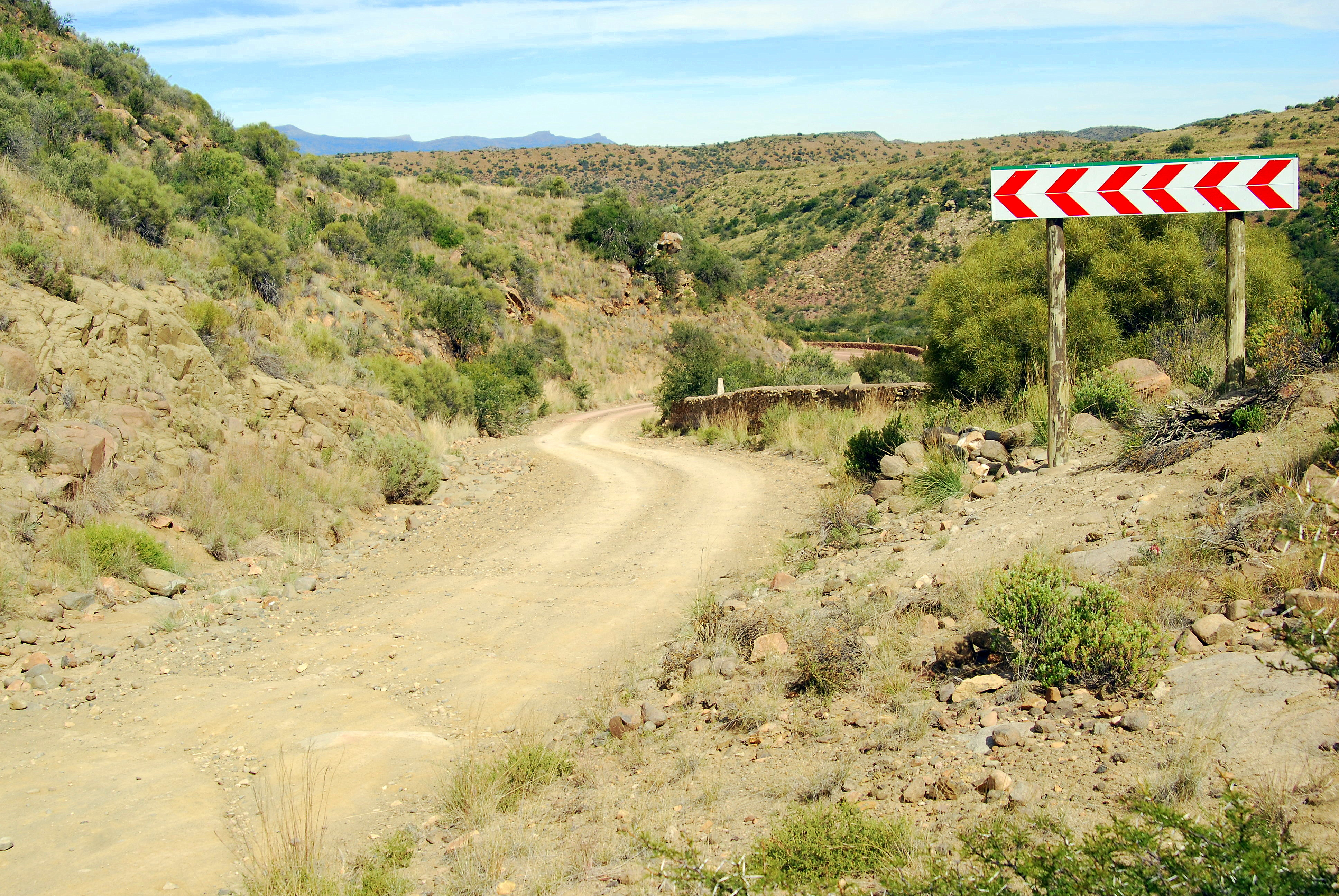 Grootdoringhoek Pass